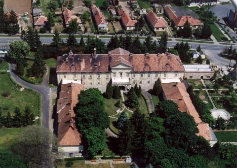 Simaság, Hungary, aerialphotography